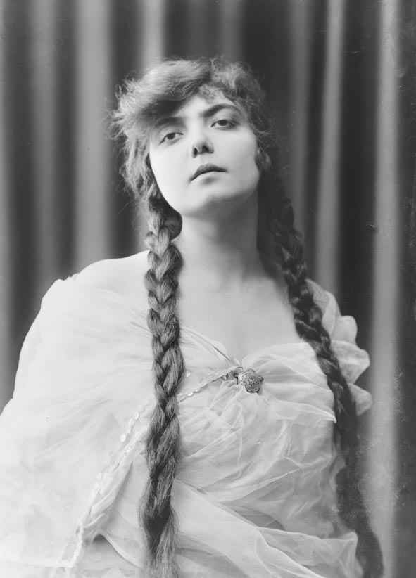 Retrat de bust de la soprano Concepció "Conxita" Supervia i Pascual.